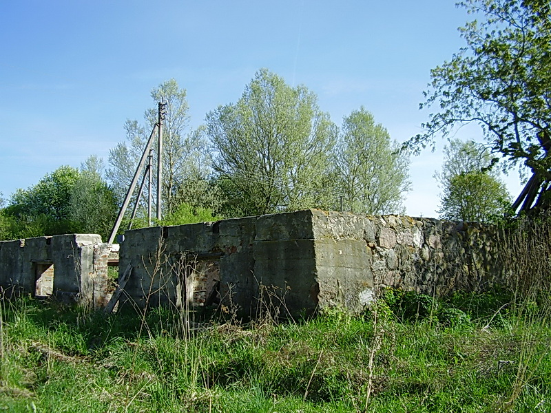 Ручыца. Рэшткі вадзянога млына